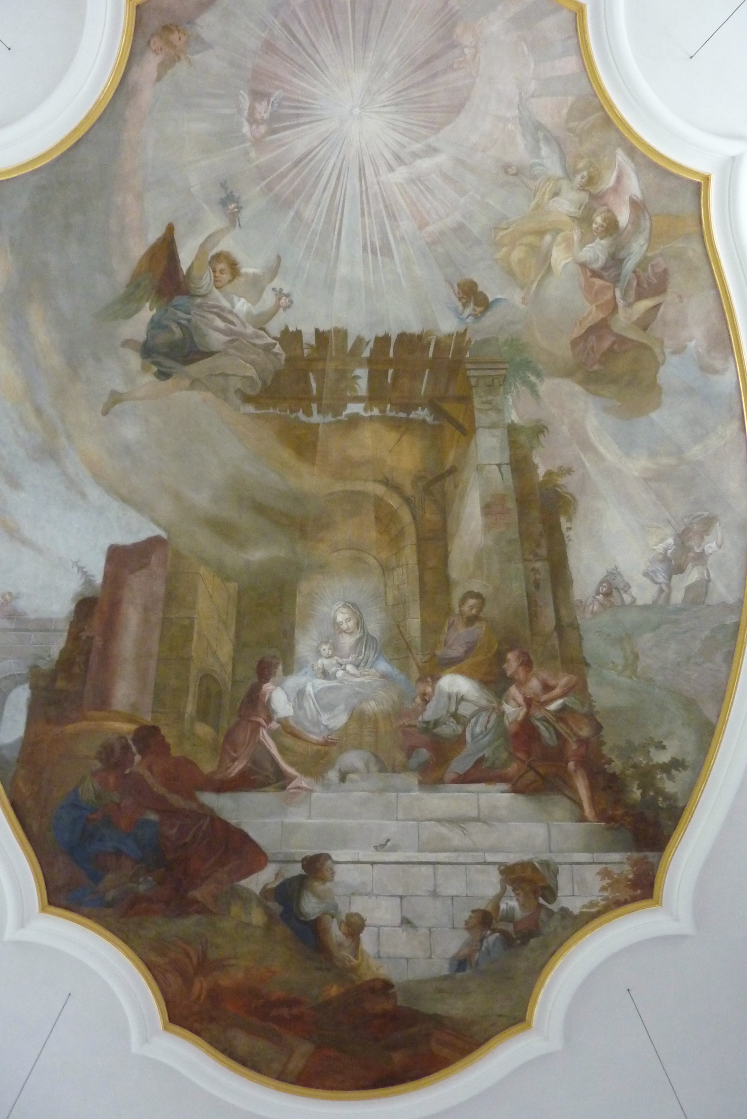 Katholische Kirche St. Andreas in Gremheim, einem Ortsteil von Schwenningen, Deckengemälde von Jakob Huwyler, von 1908, Darstellung: Geburt Christi